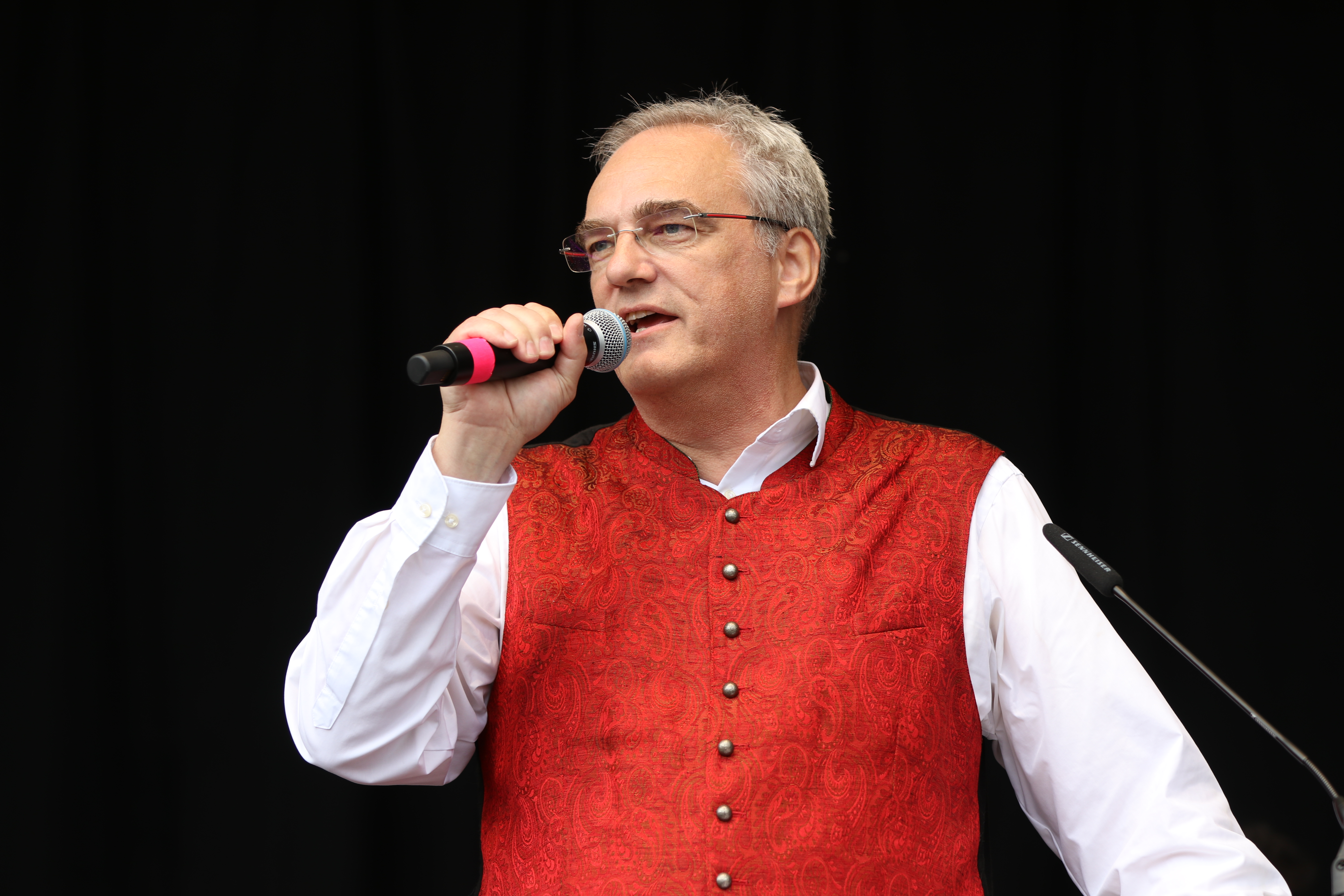 Ausgehetzt, Demonstration in München am 22. Juli 2018 gegen den Rechtsruck in der bayerischen Politik